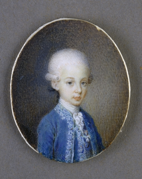 Erzherzog Ferdinand von Österreich-Toskana.